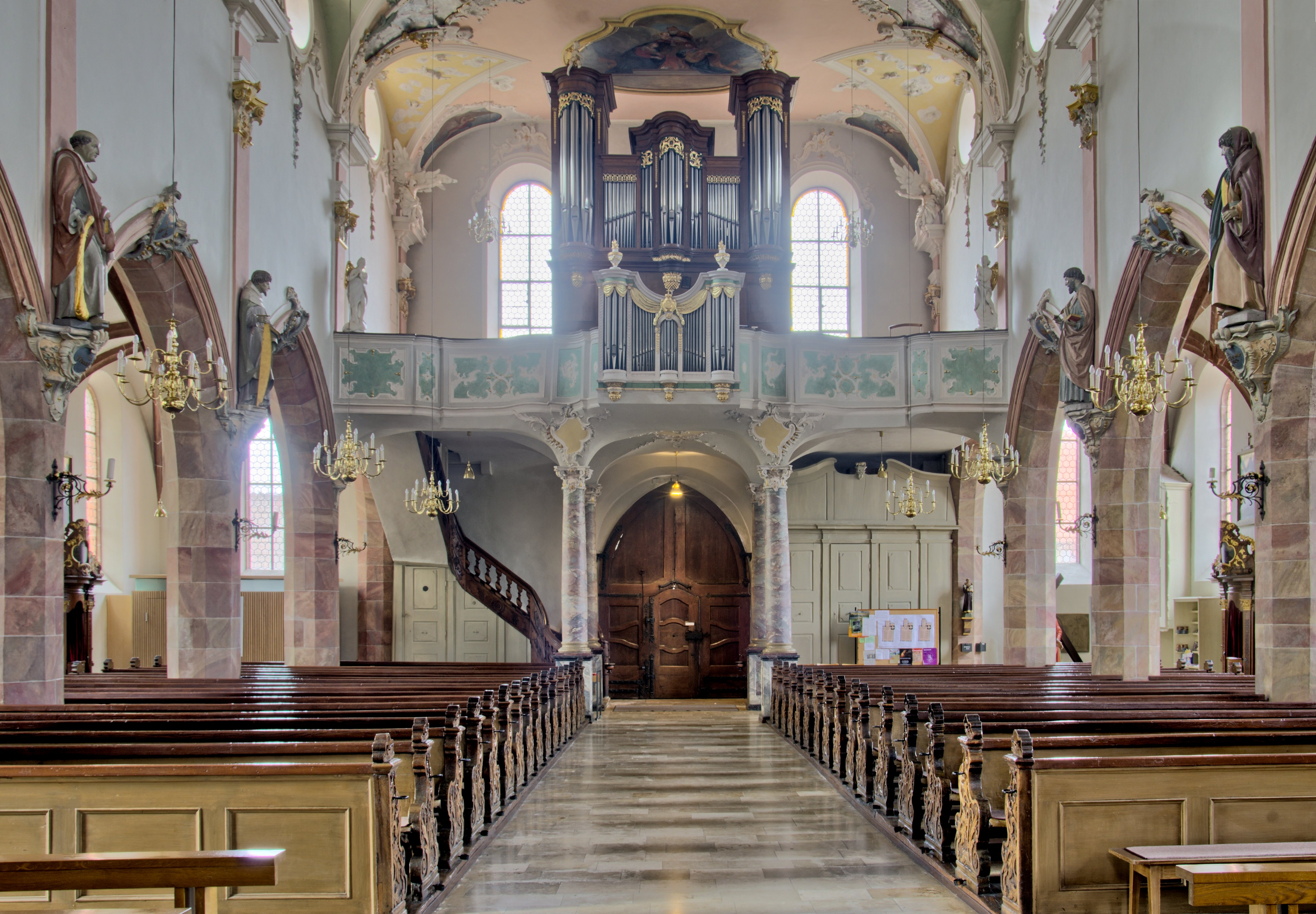 Bilder des Innenraums der Kirche St. Mariä Himmelfahrt in Kirchhofen, einem Teil der Gemeinde von Ehrenkirchen.